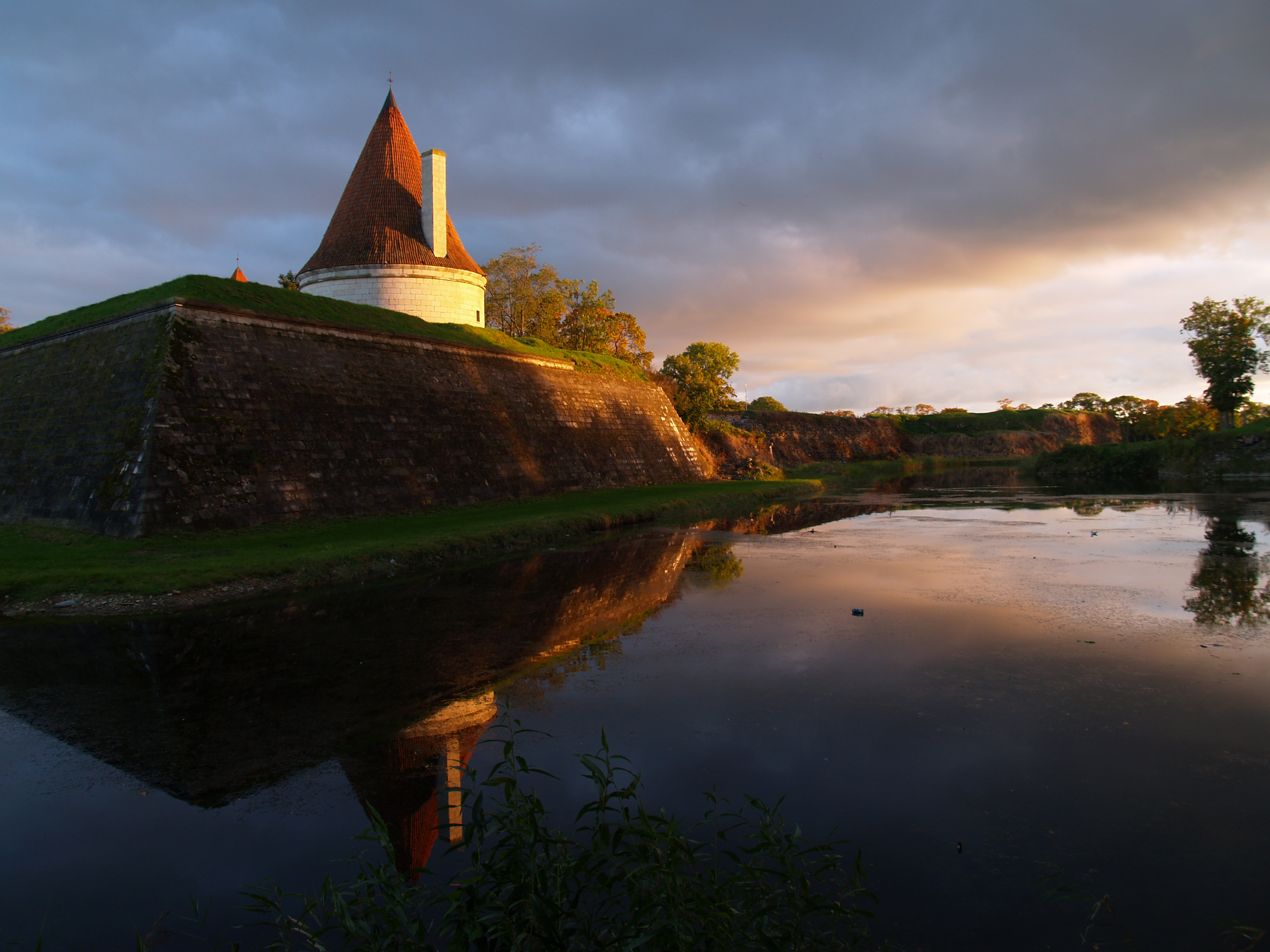 Kuressaare piiskopilinnus. Põhjabastioni suurtükitorn.